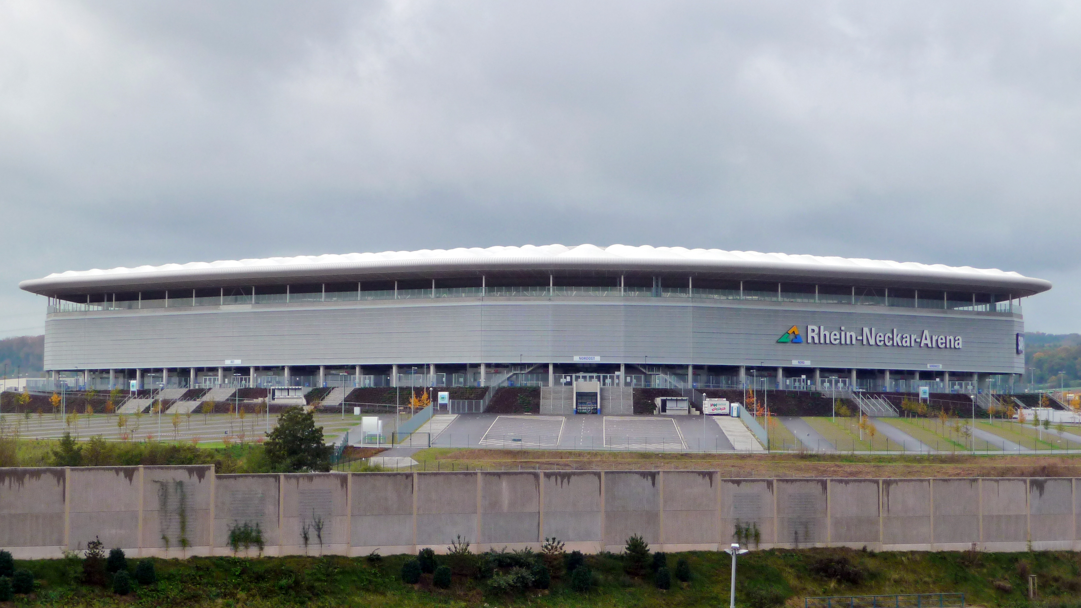 Rhein-Neckar-Arena in Sinsheim (Rhein-Neckar-Kreis, Baden-Württemberg, Deutschland)